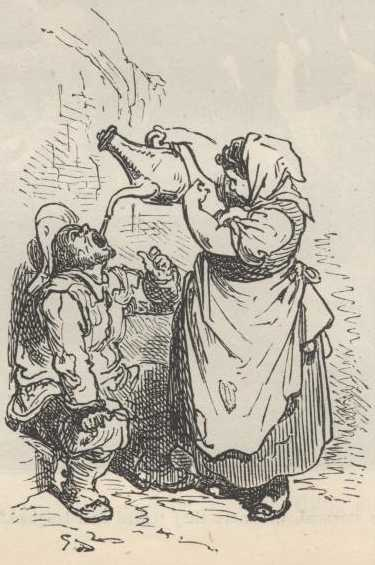 Sancho Pança bebe o vinho que lhe é dado por Maritornes